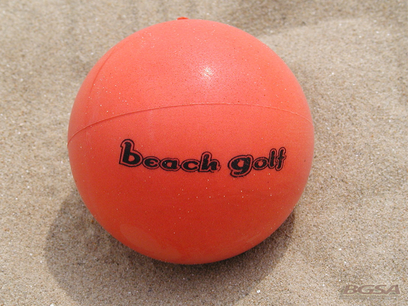 Pallina utilizzata nel Beach Golf, evento di sport marketing e comunicazione